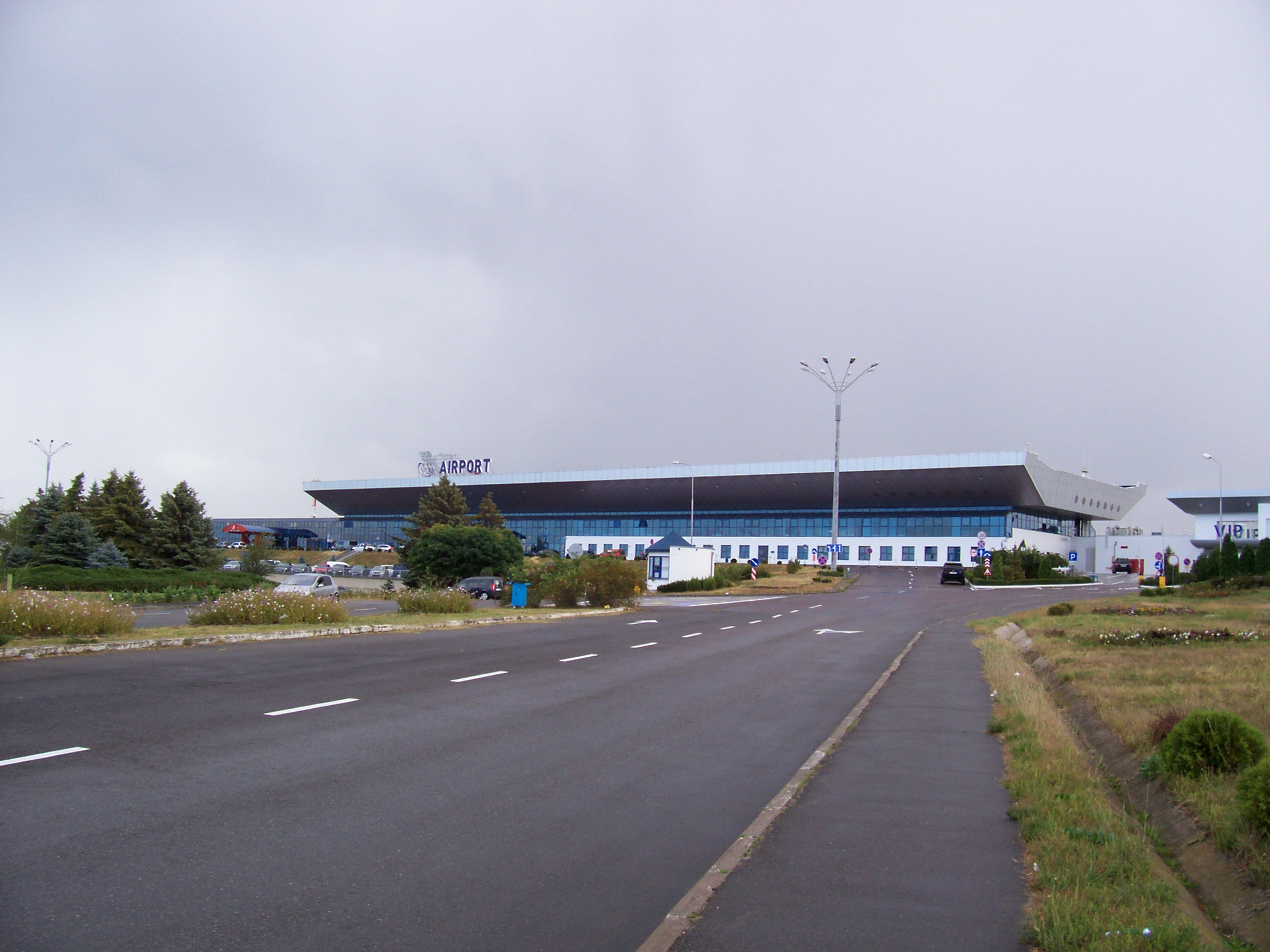 Aeroportul Internațional Chișinău, 2011